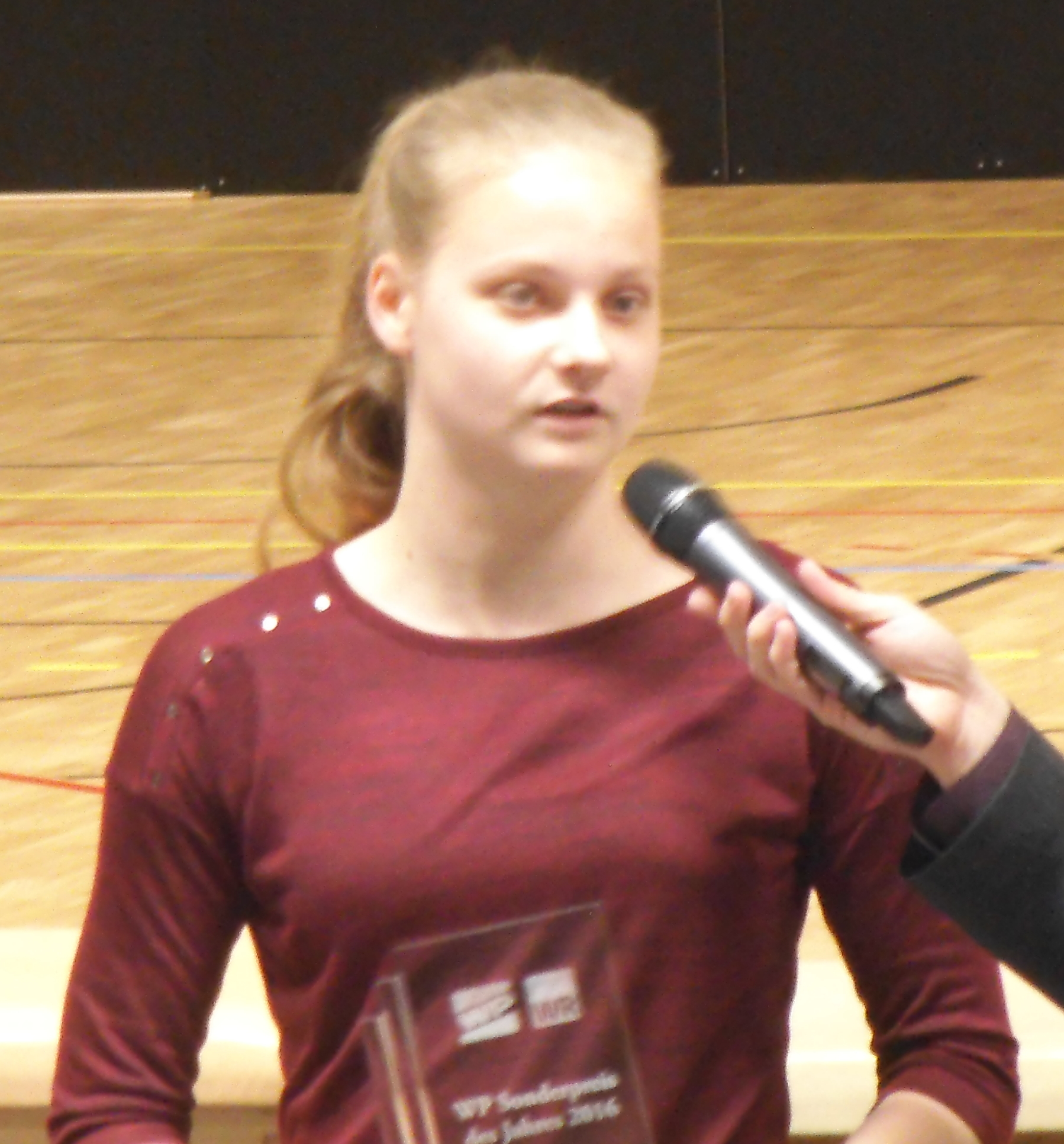 Lisa Klostermann bei der Sportler-des-Jahres-Ehrung des Ennepe-Ruhr-Kreises am 14. März 2017 in der Dreifachhalle Schwelm, interviewt von Marc Schulte.